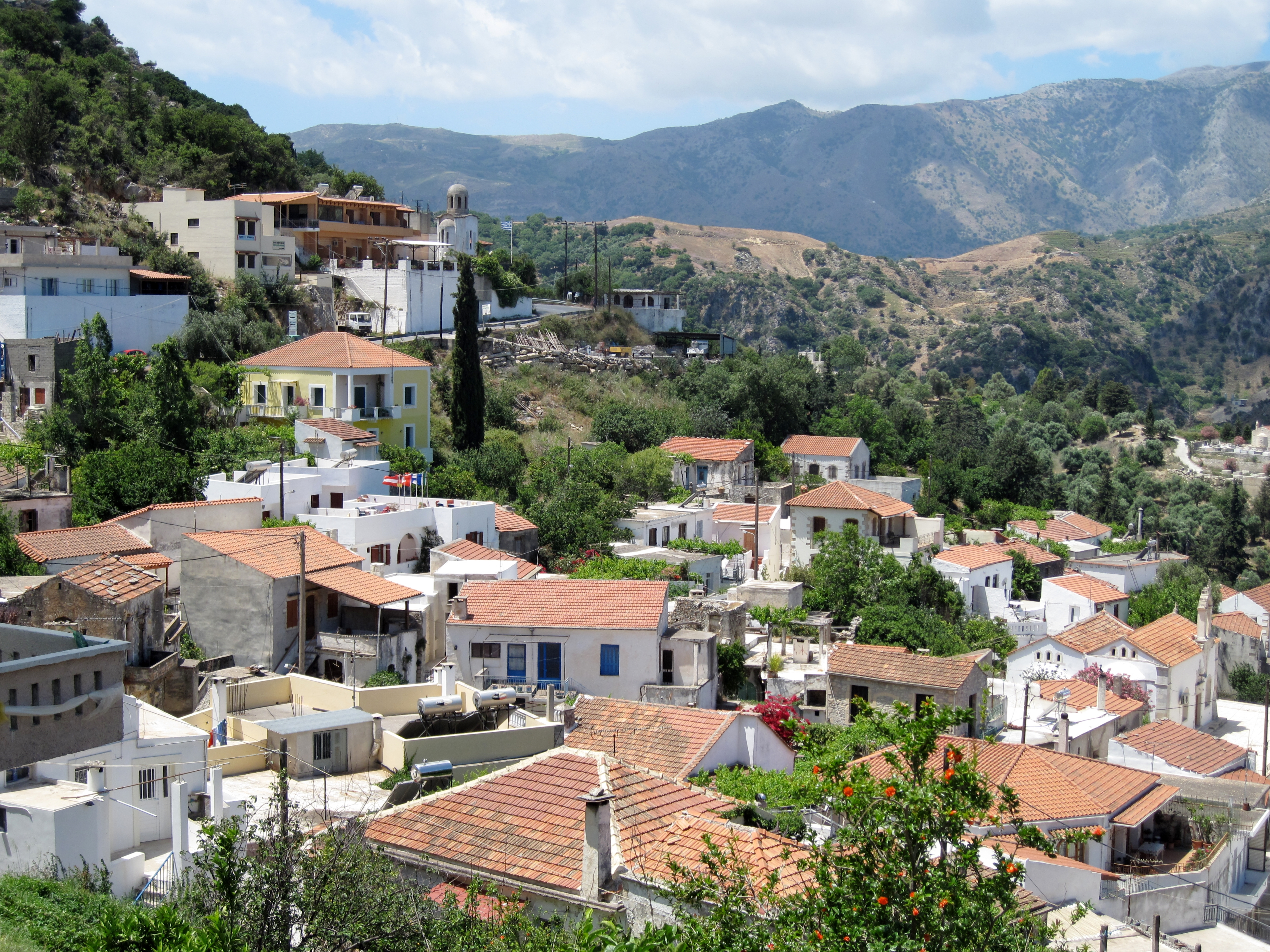 Argyroupoli, Gemeinde Rethymno, Regionalbezirk Rethymno, Kreta, Griechenland